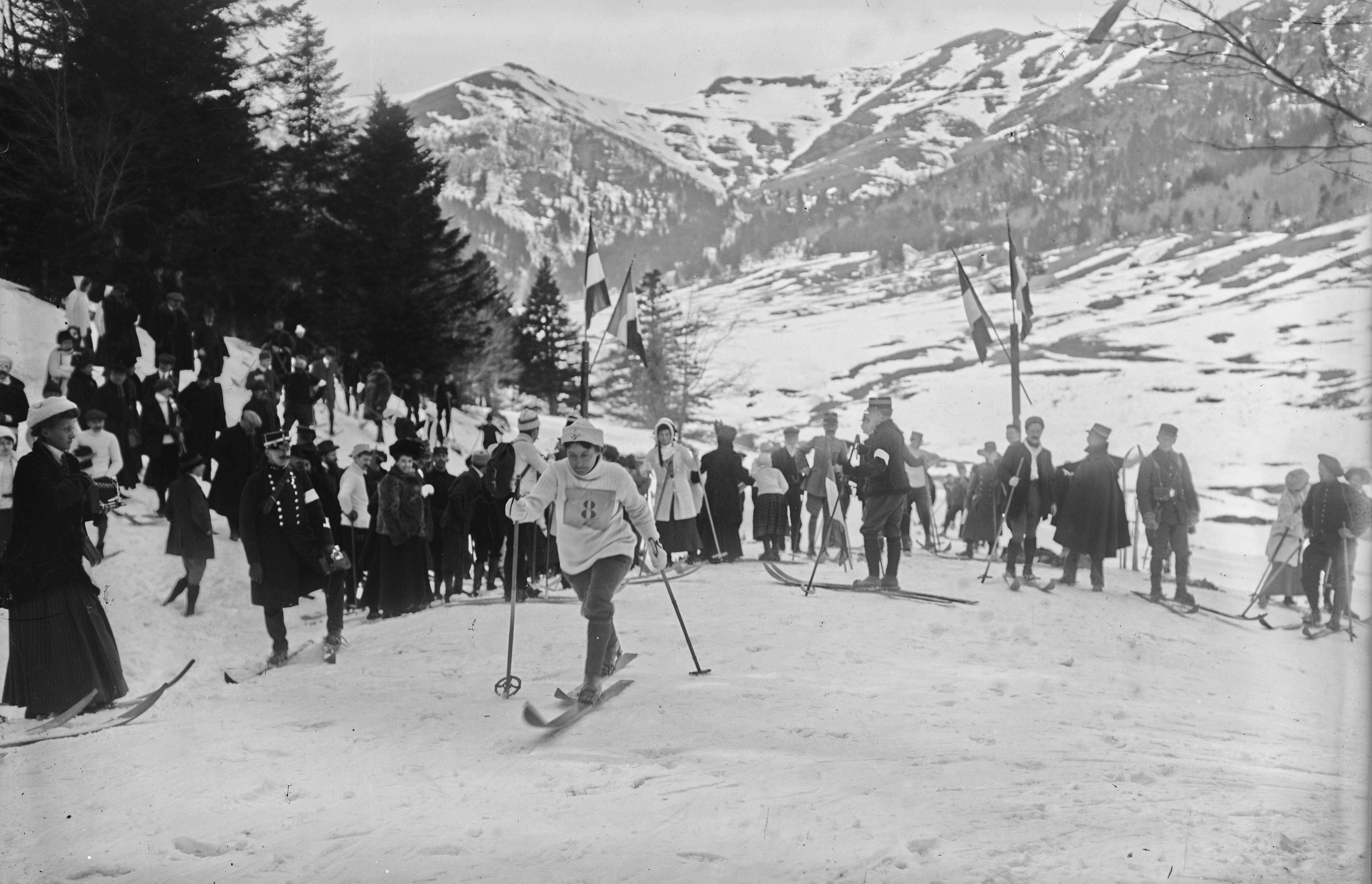 Le Lioran, 12/2/11, Mlle Marvingt dans la course des dames